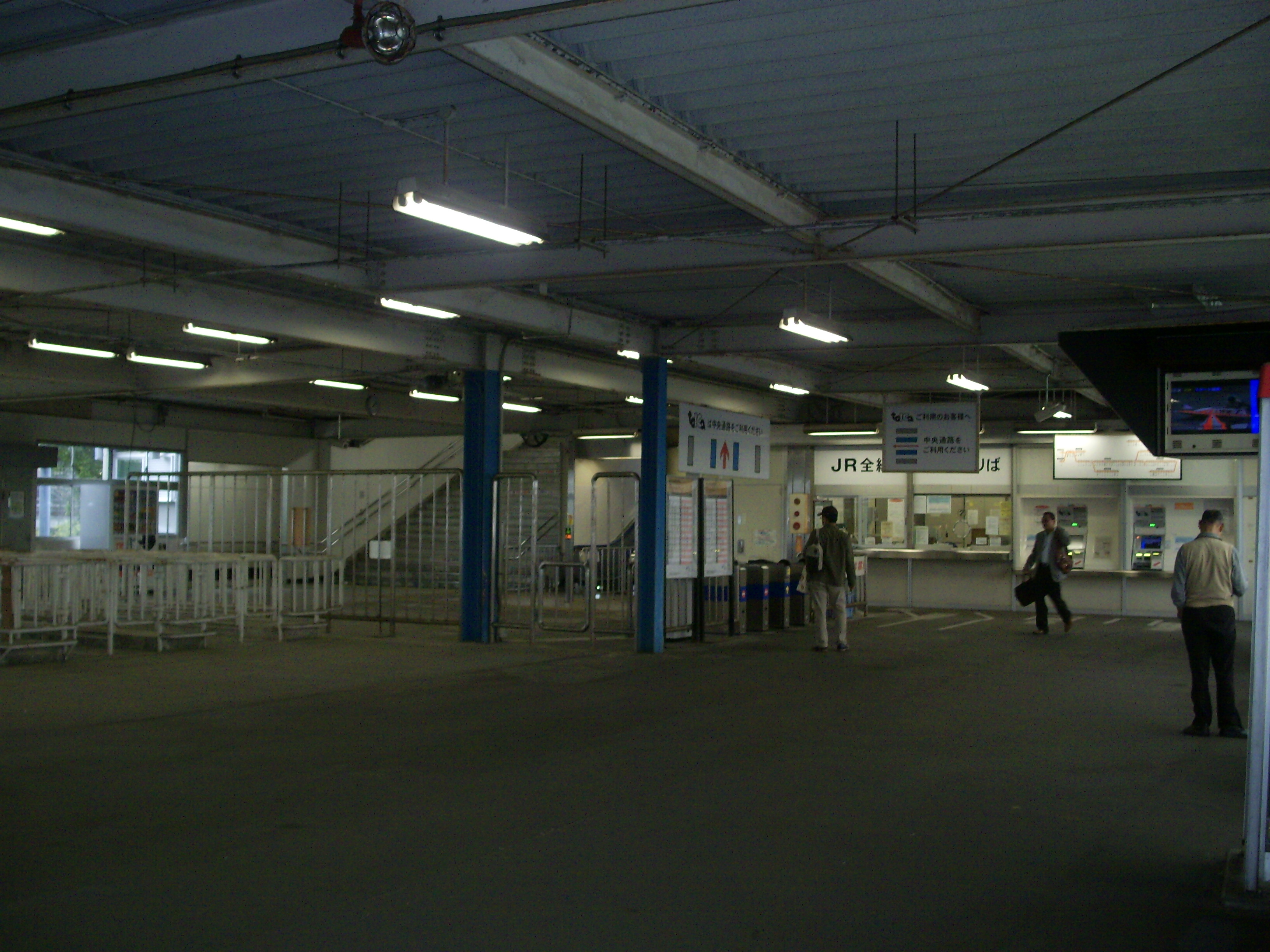 東海道線新居町駅の浜名湖競艇場臨時改札、レース速報を伝えるモニターも設置されている ㊟カメラを起動すると日付機能が出荷時のものに初期化されるため、ファイル履歴の撮影日時とメタデータの原画像データの生成日時が異なります